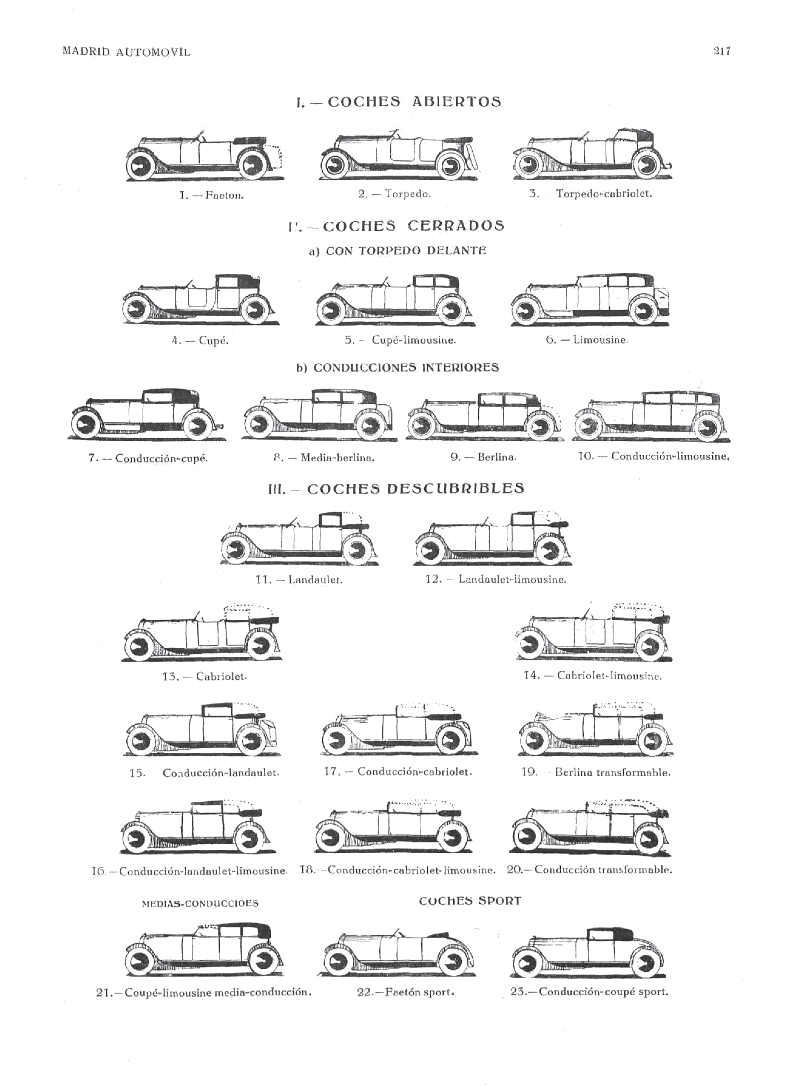 Tipos de coches según su carrocería